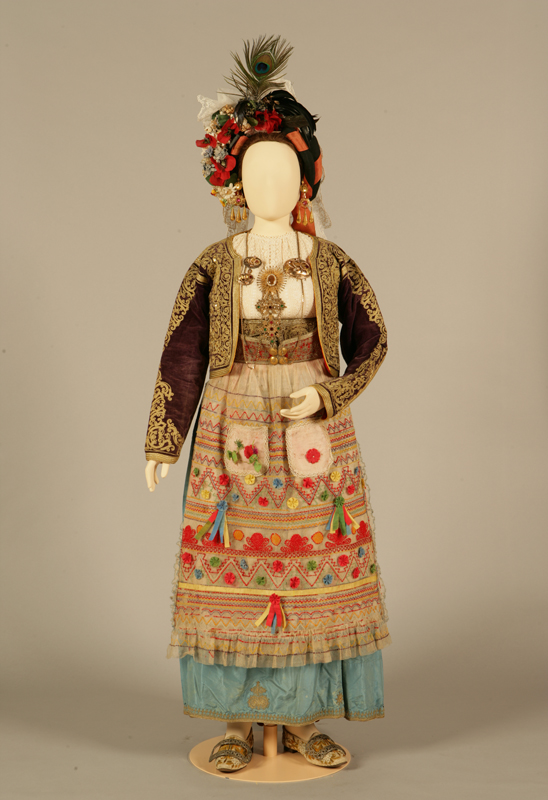 Γυναικεία φορεσιά Λευκίμμη Κέρκυρας, Επτάνησα. Αρχές 20ού αιώνα / Συλλογή Πελοποννησιακού Λαογραφικού Ιδρύματος, Ναύπλιο